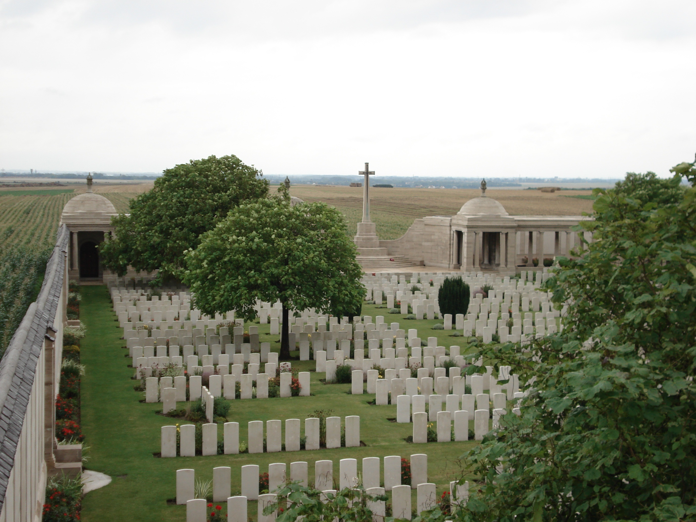 Mémorial de loos (cimetière de Dud Corner), monument en l'honneur des soldats morts lors de la bataille de Loos durant l'automne 1915. Cimetière construit par la Commonwealth War Graves Commission, architecte : Sir Herbert Baker.